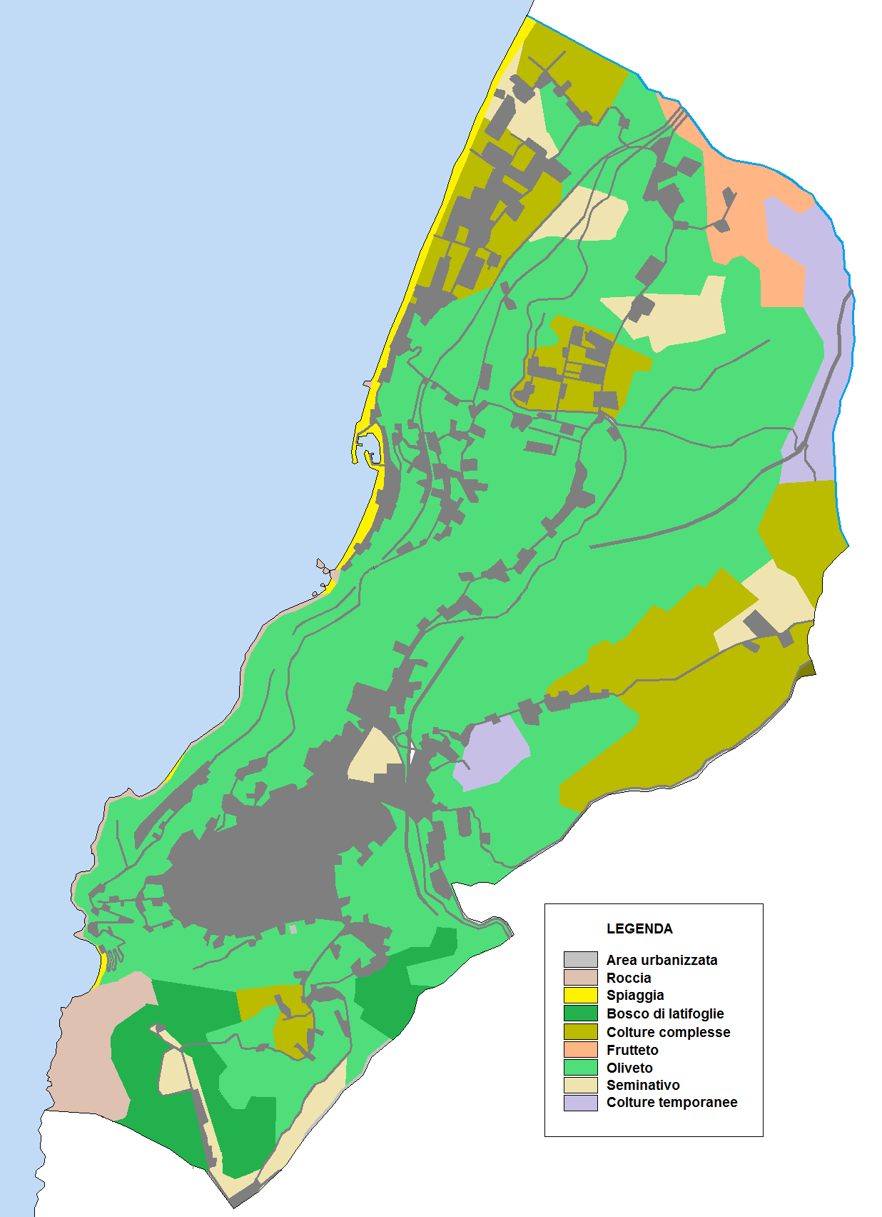 Uso terreno a Palmi